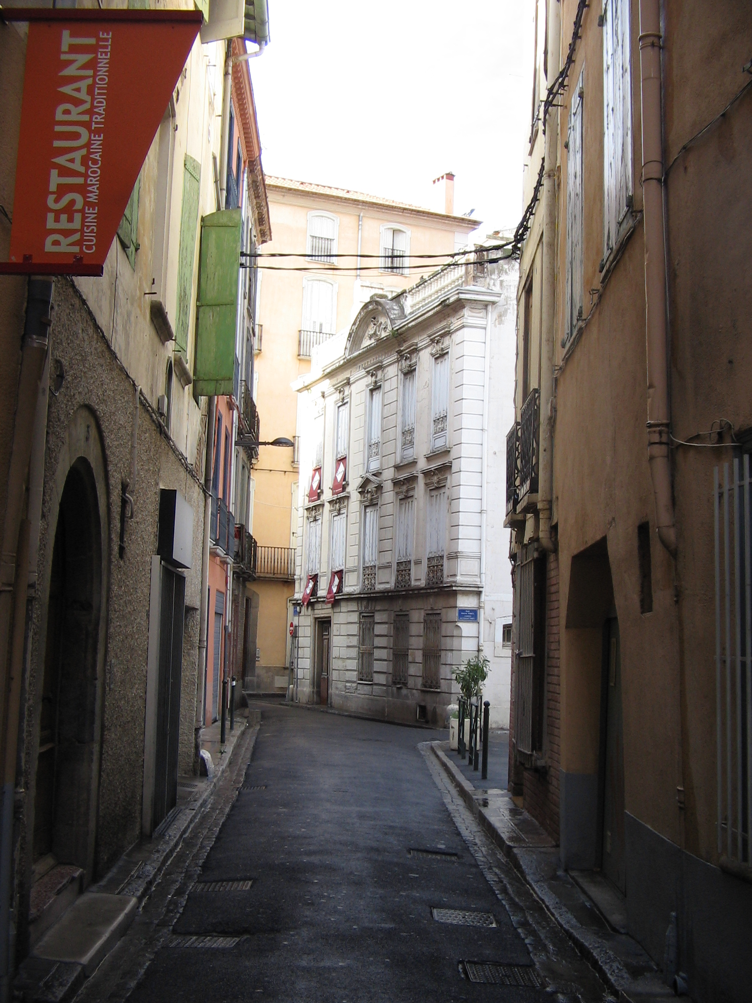 Une ruelle dans le centre ville de Perpignan (Pyrénées-Orientales, France).